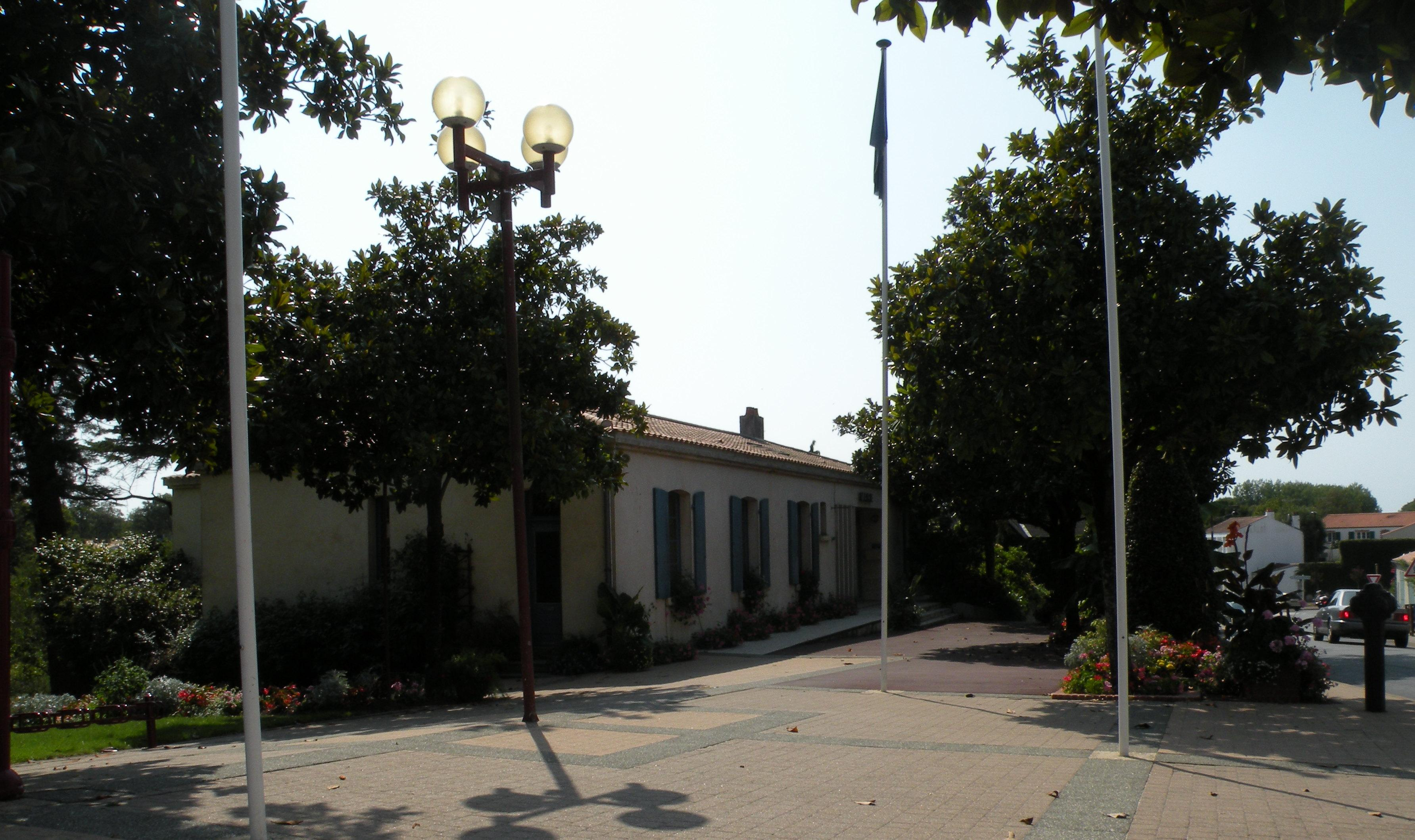 mairie de Coëx, vendée